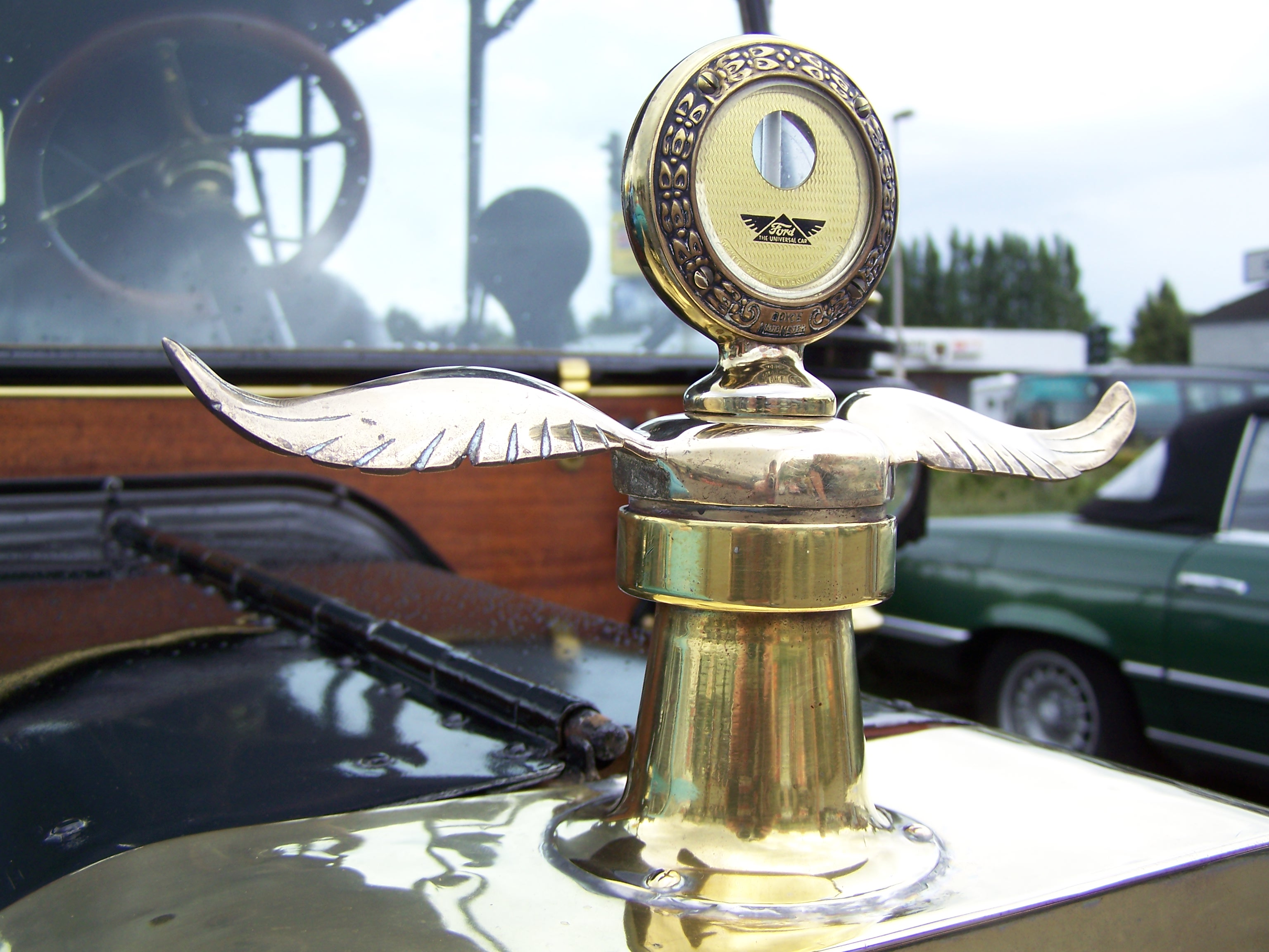 Detail Ford Modell T - 1914, in Herzogenrath